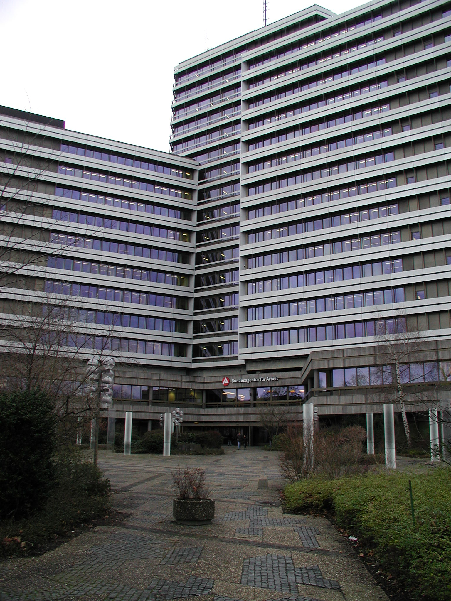 Verwaltungszentrum der Bundesagentur für Arbeit